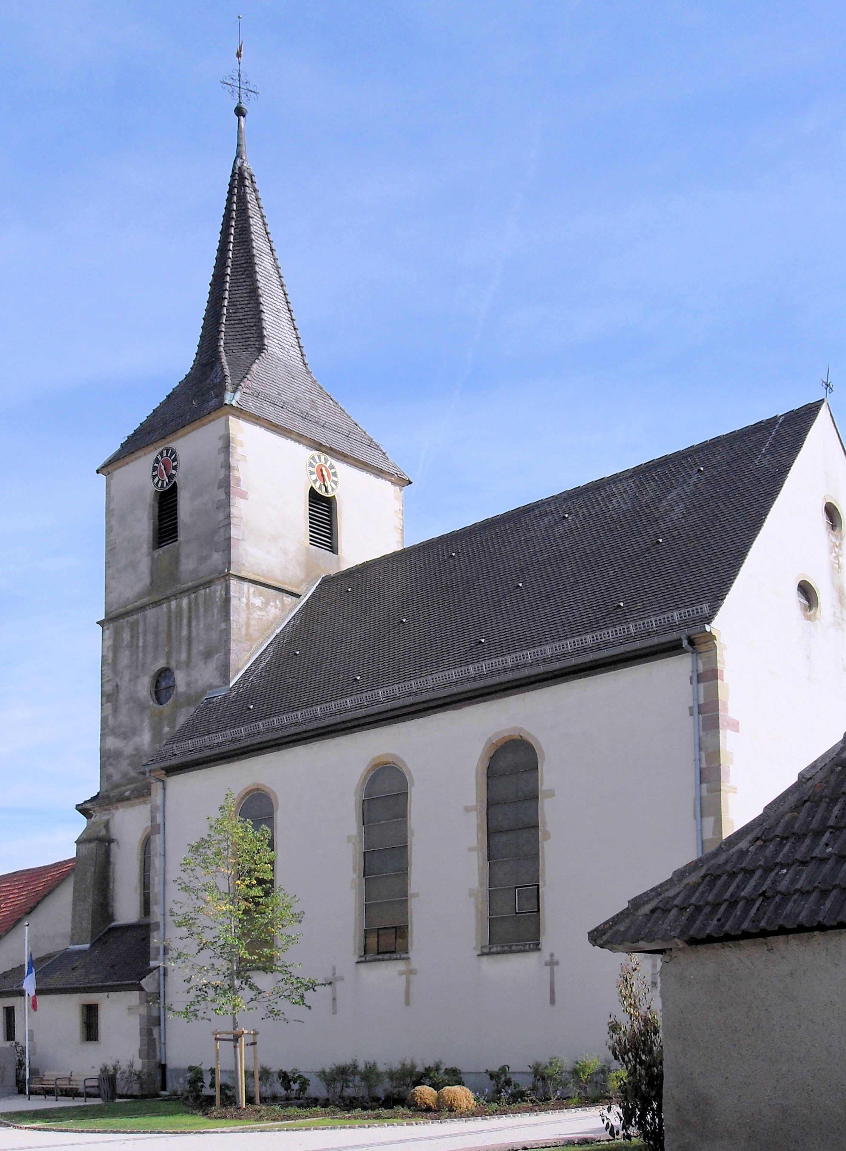 L'église Saint-Nicolas d'Oberentzen